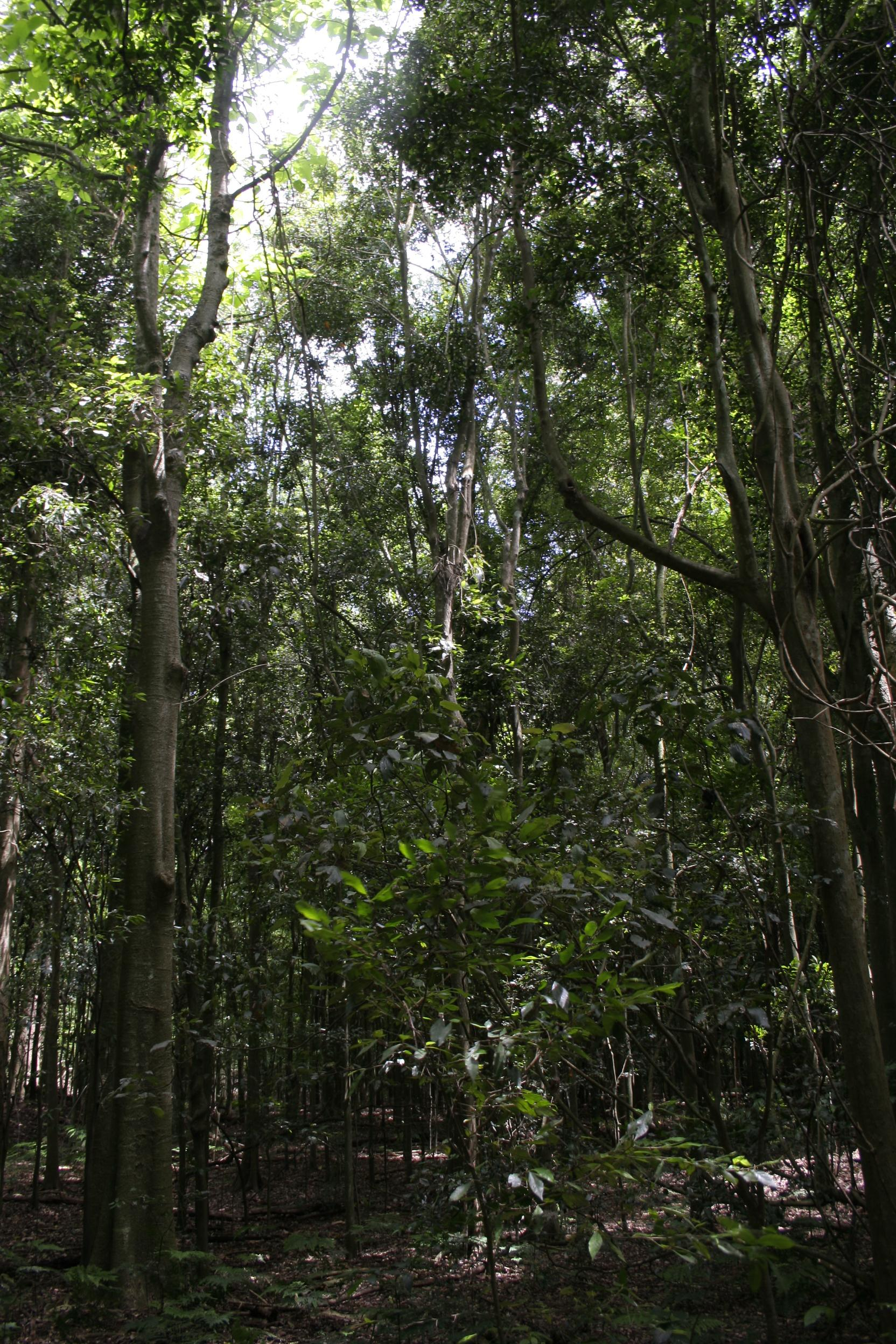 Wingham Brush